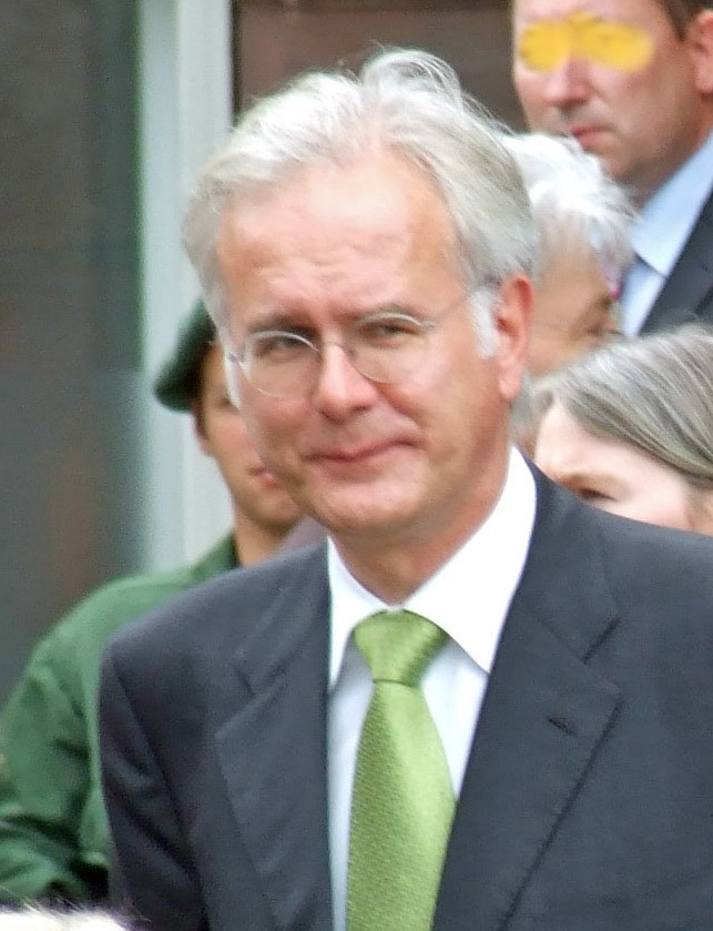 Harald Schmidt nach der Boernepreisverleihung 2007 in der Paulskirche in Frankfurt am Main